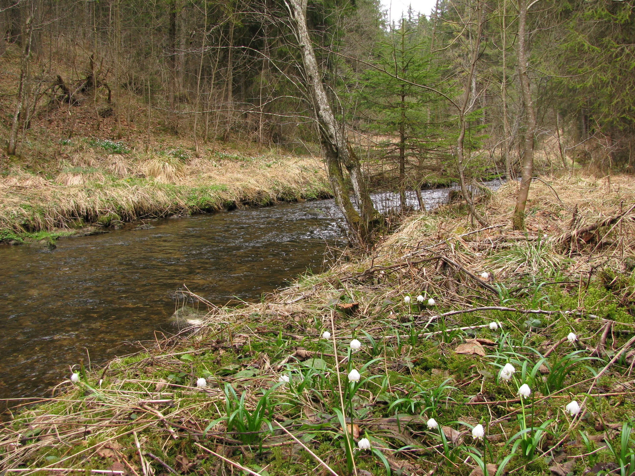 Illach in der Illachschlucht zwischen Wildsteig und Rudersau